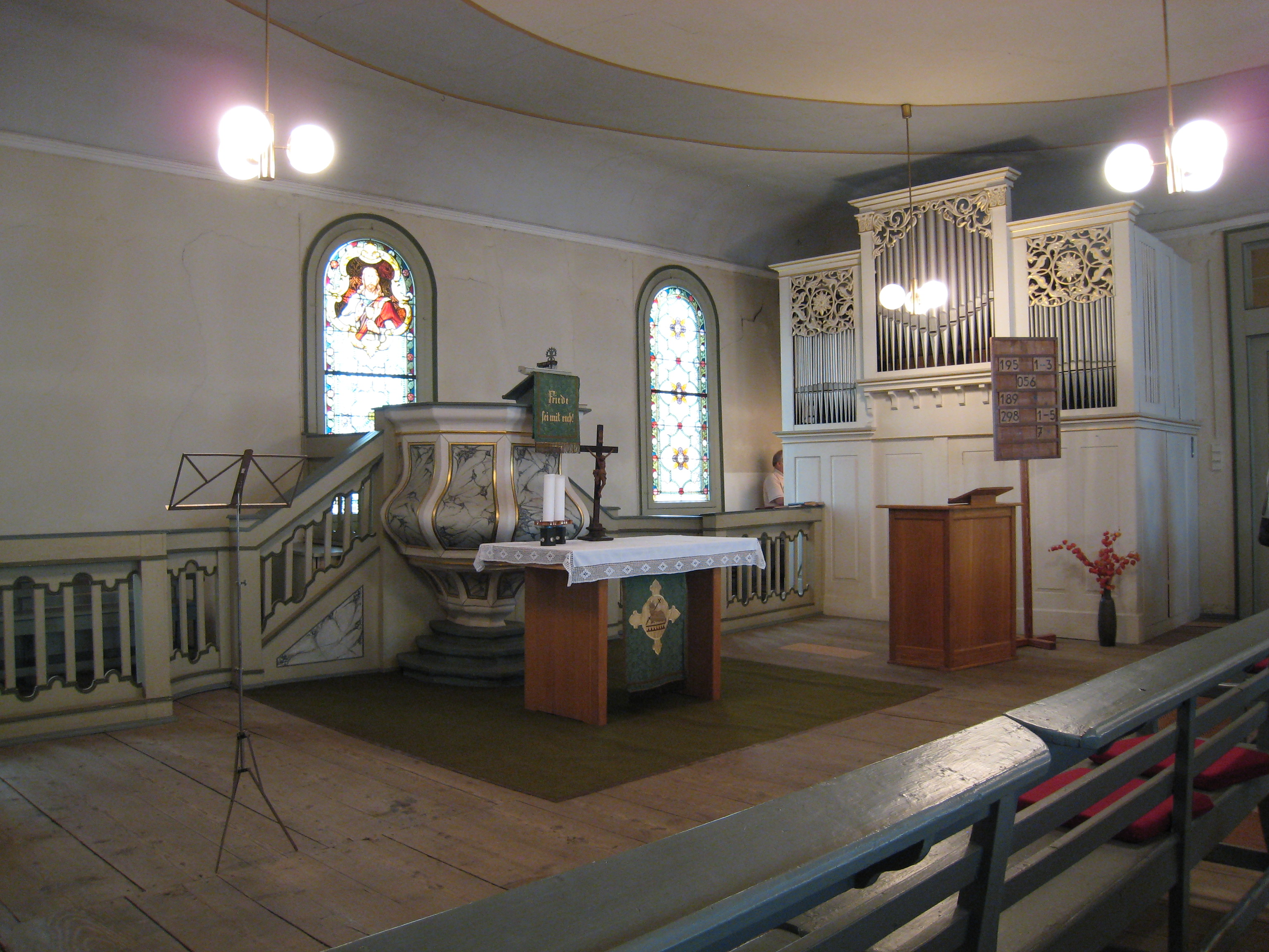 Georgenkapelle der Altlutheranter im Spittel in Arnstadt